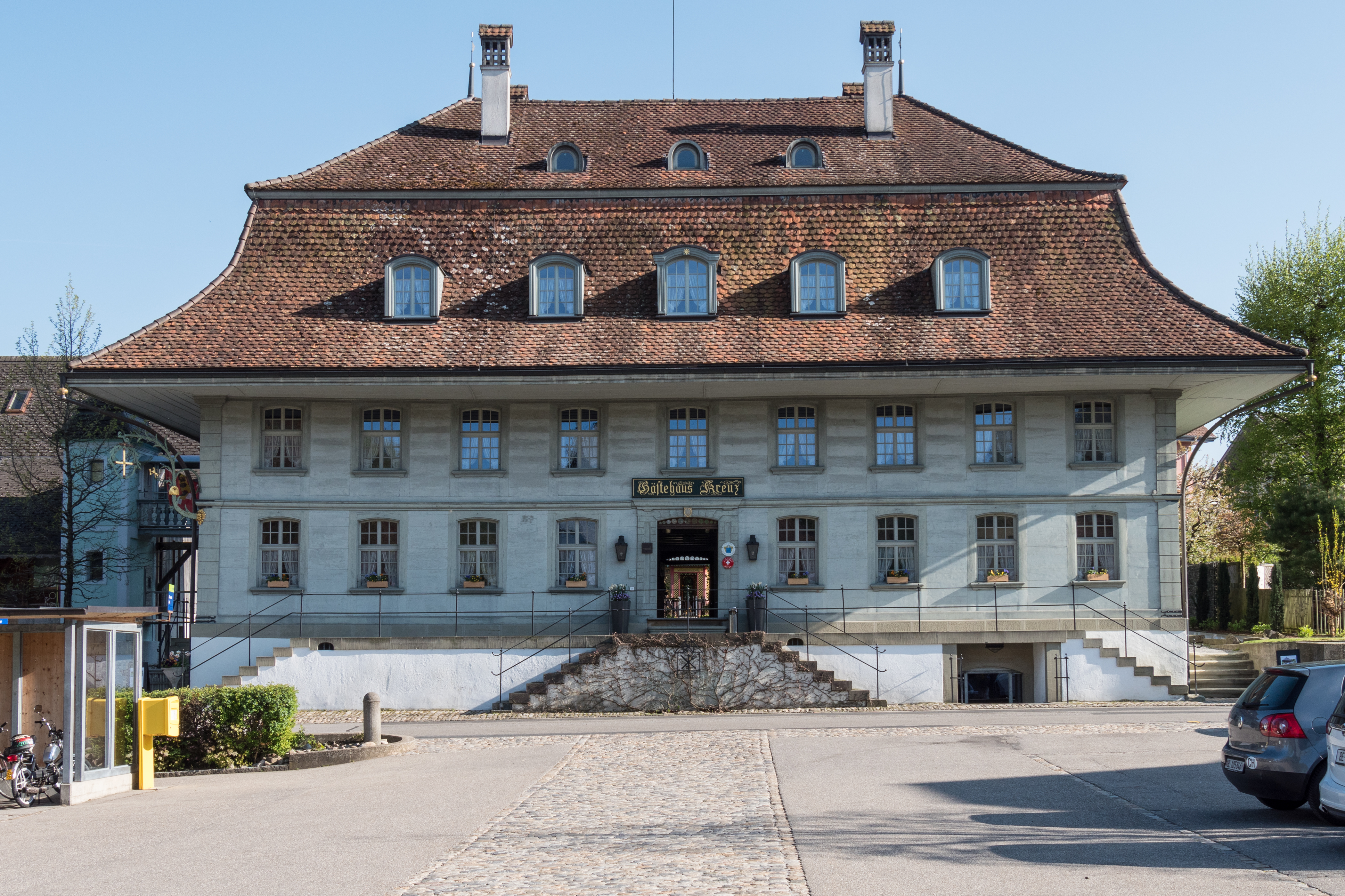 Gasthof Kreuz, erbaut 1800/06.